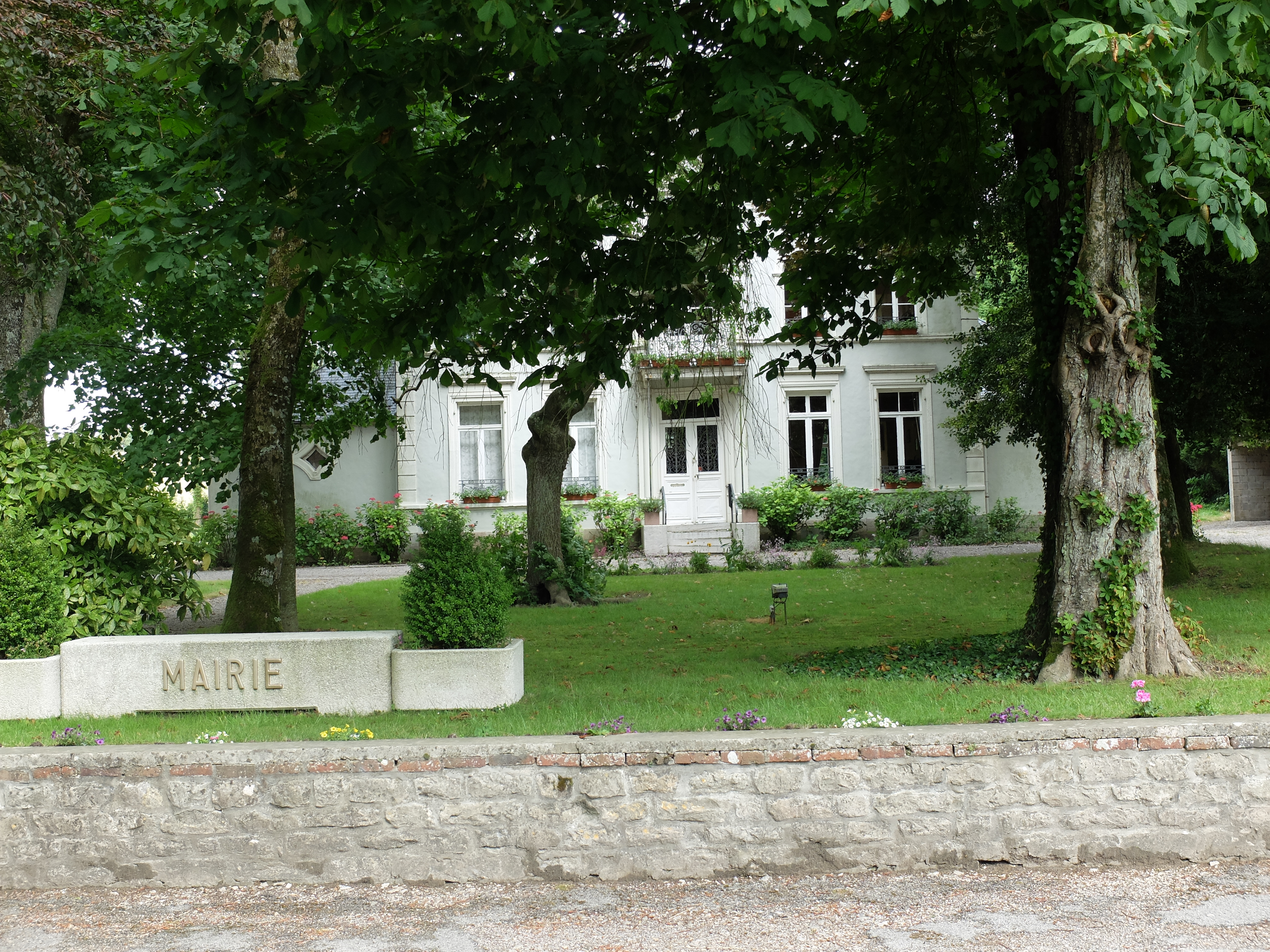 Vue de la mairie d'Hardinghen.